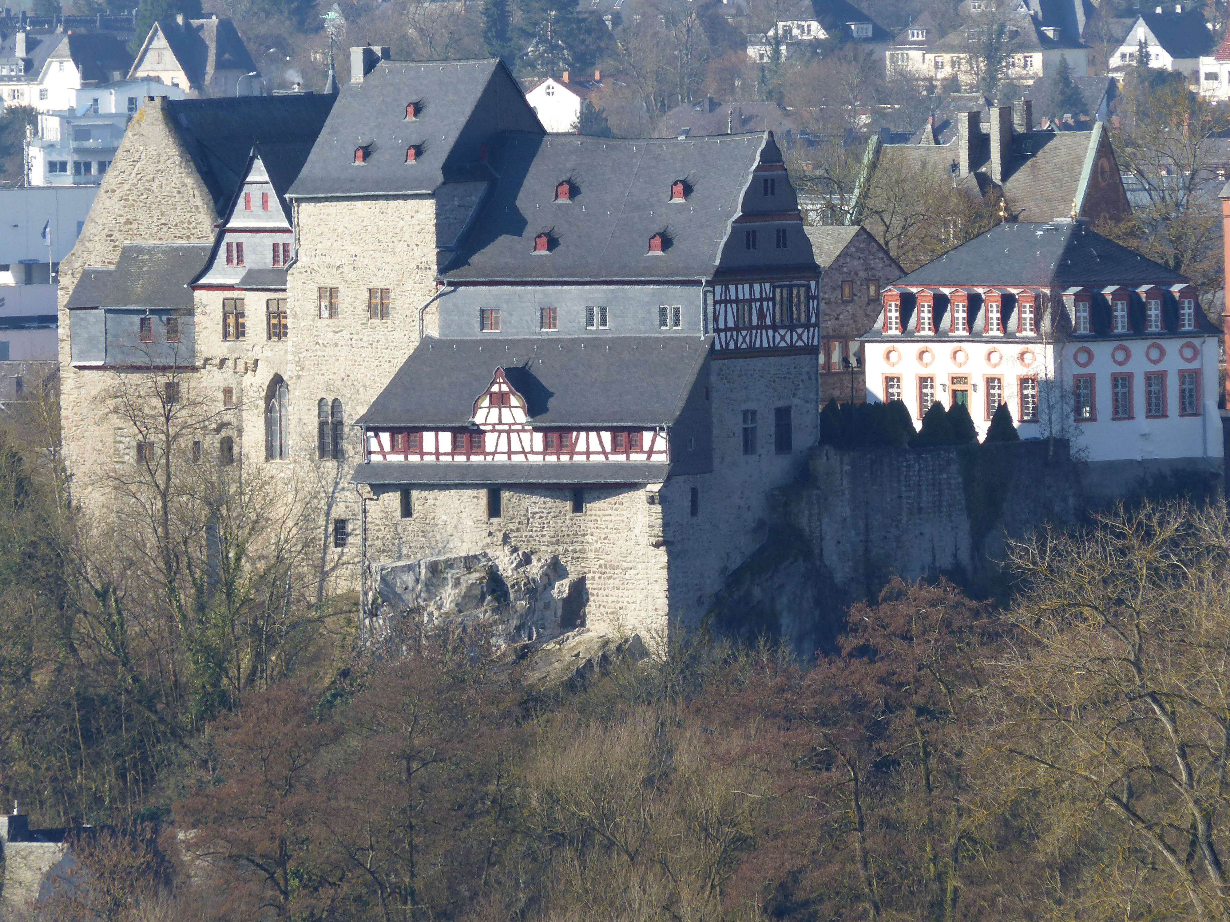 Burg Limburg (Limburger Schloss) von Osten